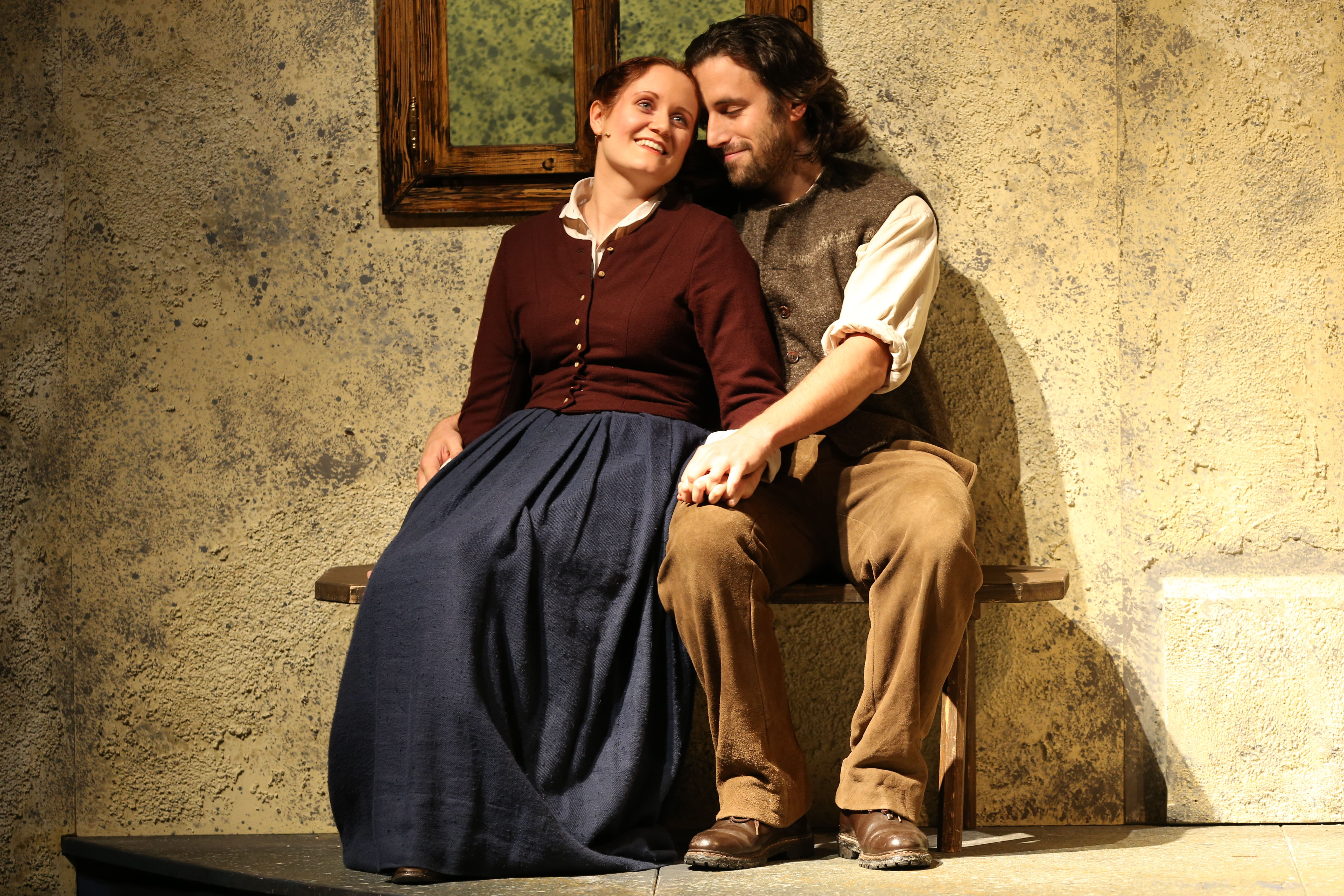 Maria und Josef des Salzburger Adventsingens